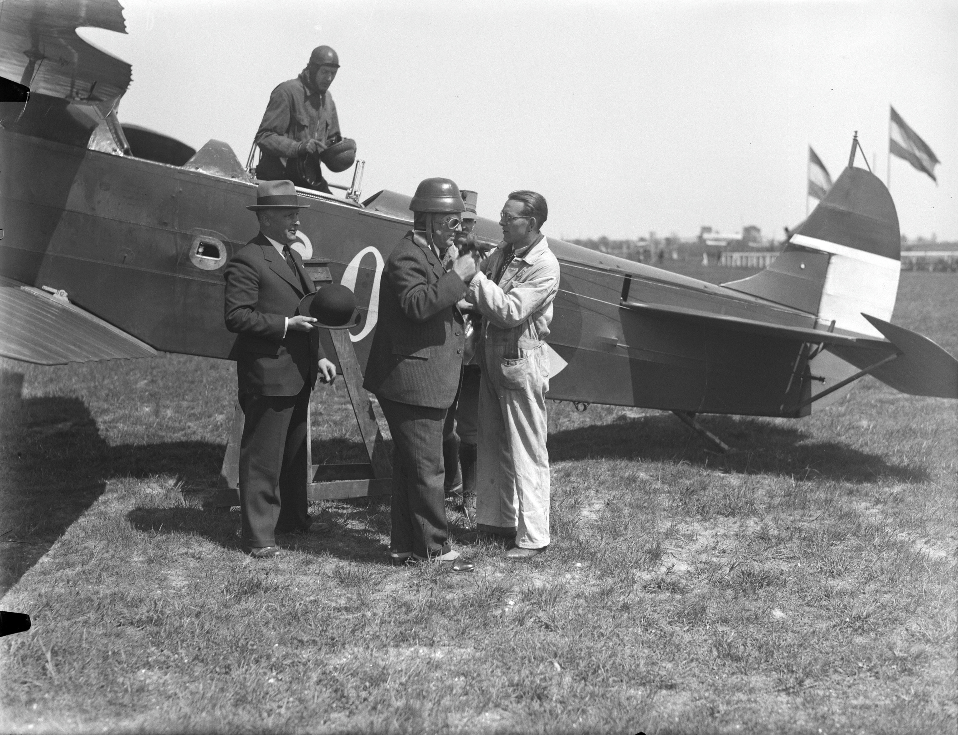 Luchthaven: Luchthaven Eindhoven: de minister arriveert voor een officiële opening (opmerking: Oorspronkelijk bijschrift: 'Officiële opening stationsgebouw vliegveld. De minister arriveerde met een esquadrille vliegtuigen uit Soesterberg.')